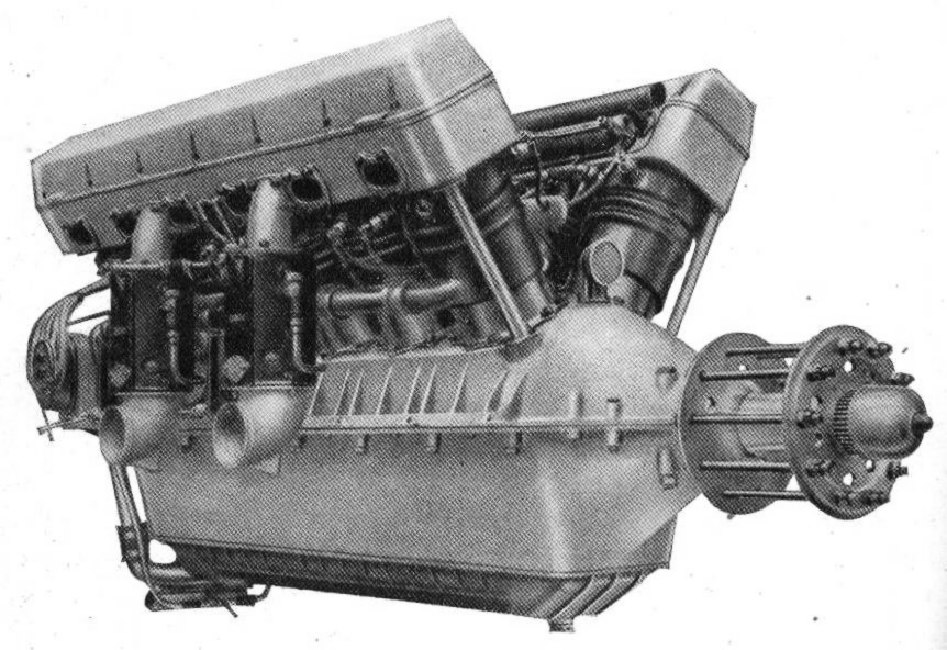 Motore aeronautico Isotta Fraschini Asso 500 Categoria:Immagini di motori aeronautici